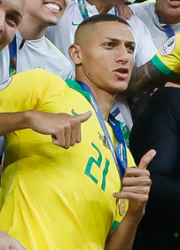 (Rio de Janeiro - RJ, 07/07/2019) Presidente da República, Jair Bolsonaro, e o Presidente da Confederação Sul-Americana de Futebol (CONMEBOL), Alejandro Domínguez, durante entrega da premiação da Copa América 2019. Foto: Carolina Antunes/PR